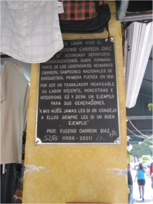 Placa conmemorativa a Don Eugenio Carreón Díaz que recuerda el que fuera su domicilio.